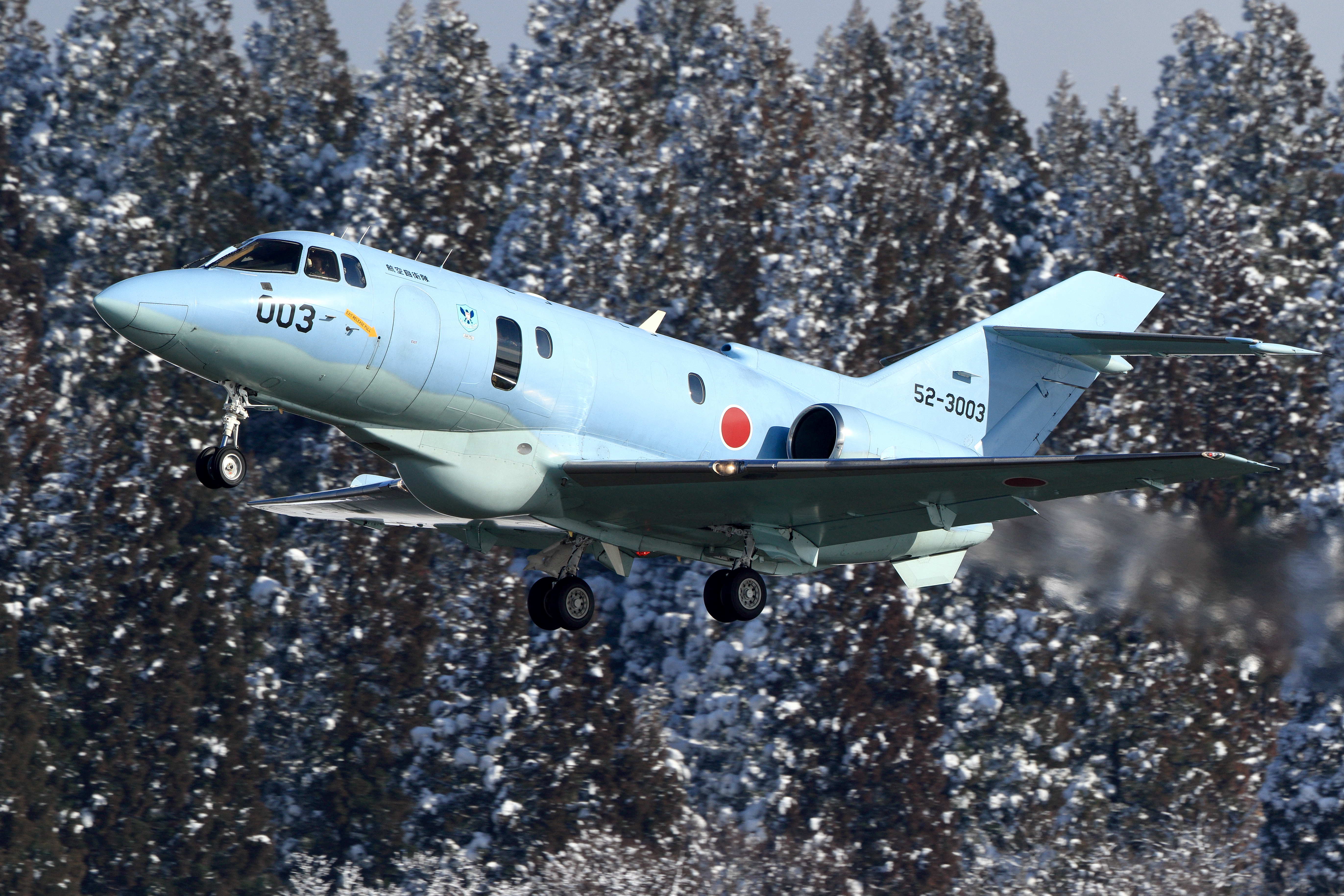 秋田空港で撮影された、航空自衛隊秋田救難隊のU-125A